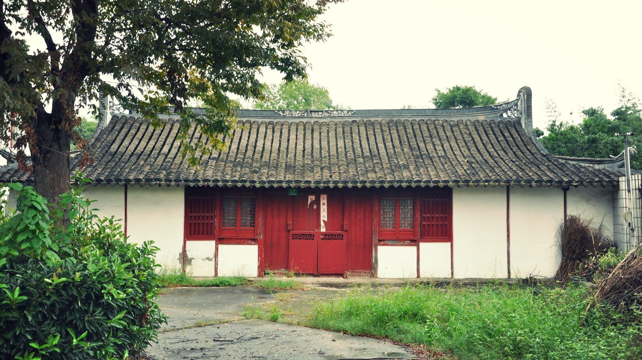 许氏住宅 华亭毛桥村17号